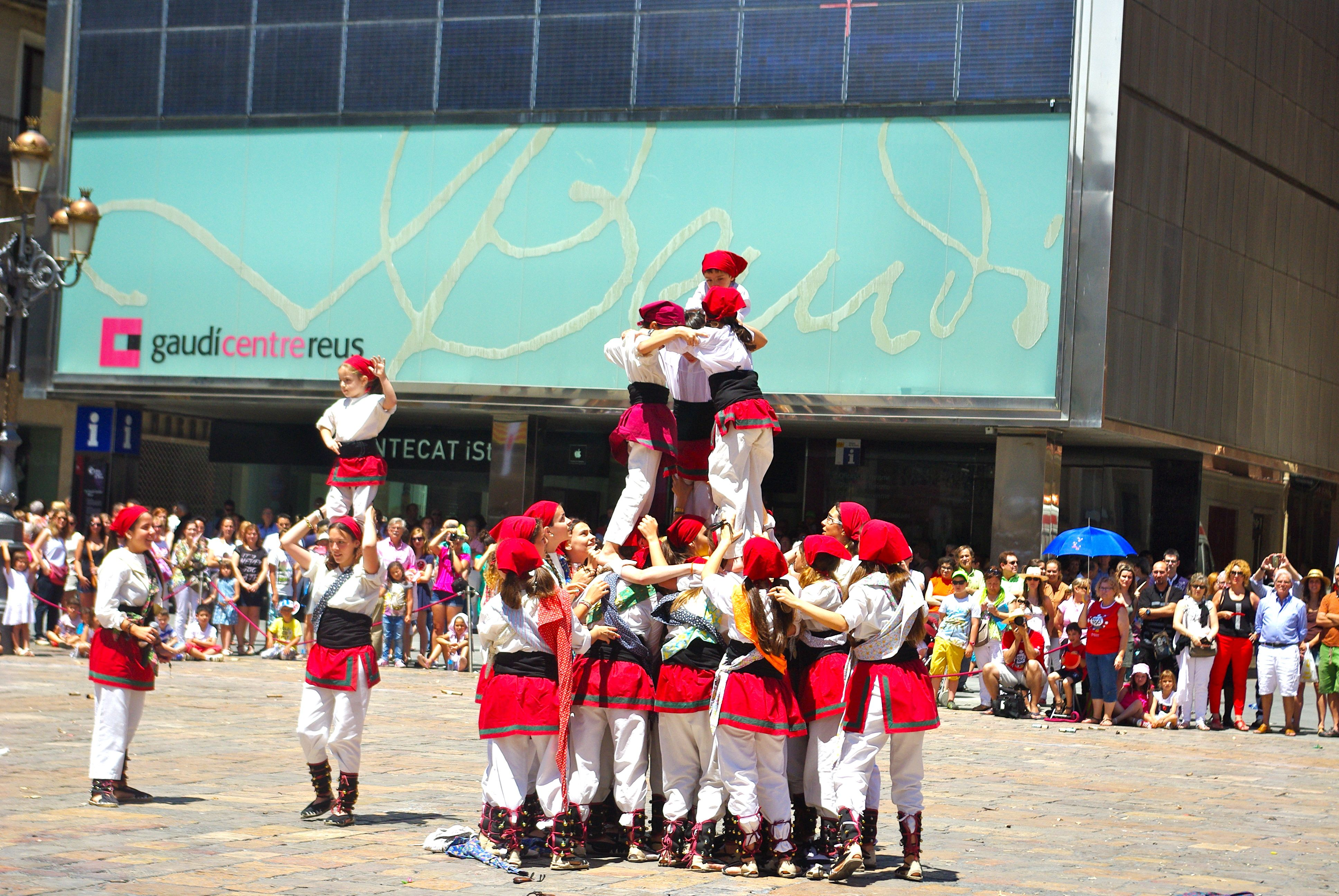 Ball de Valencians. Sant Pere de 2014